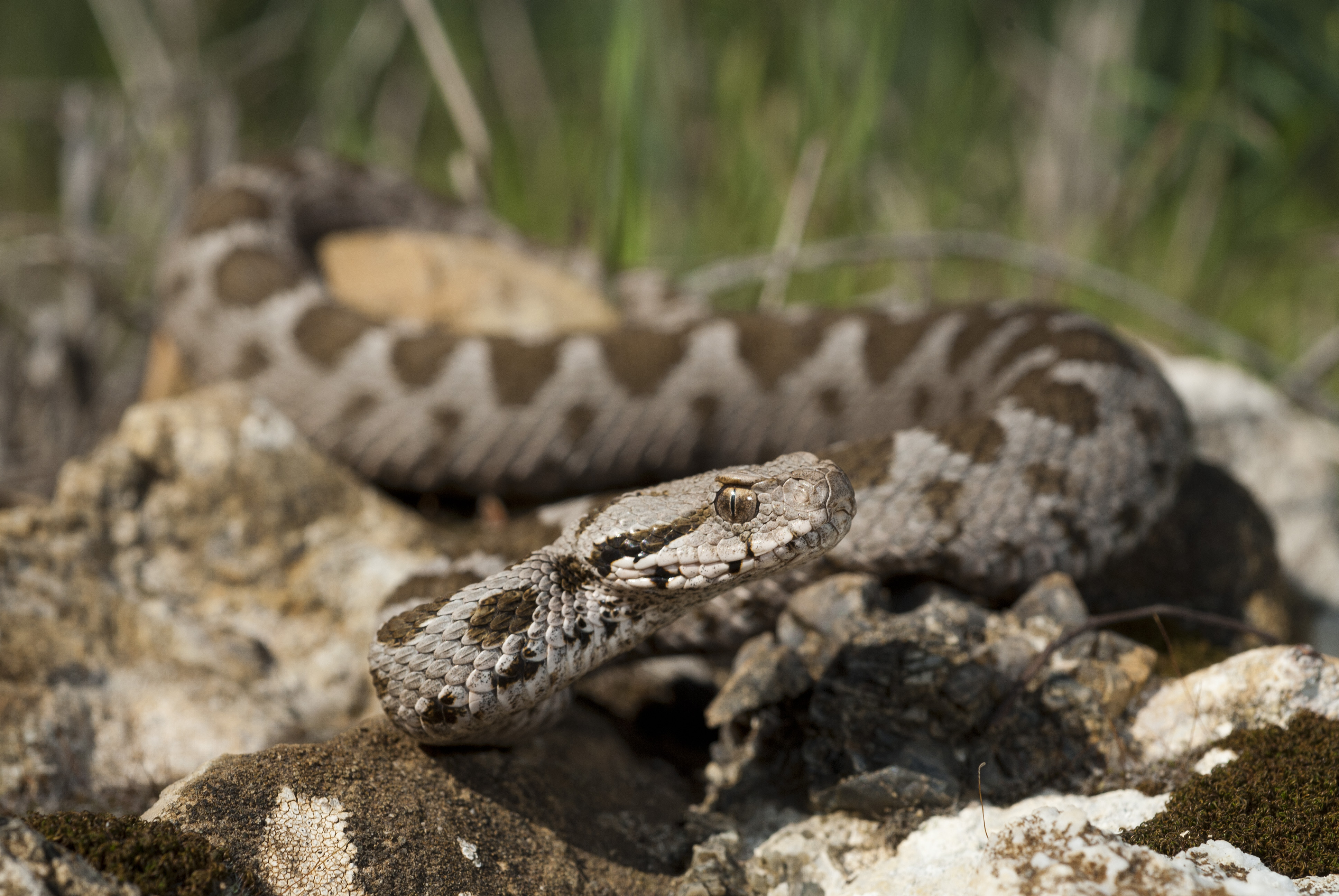 Kleinasiatische Bergotter (Jungtier) aus Thrakien in Griechenland